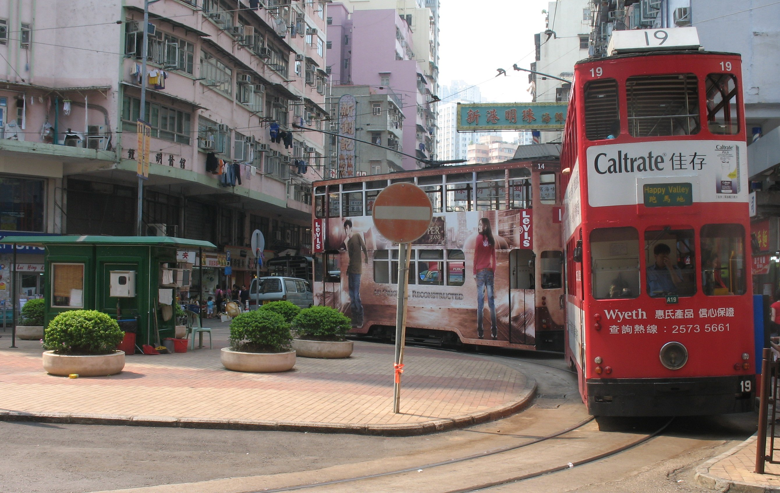 Shau Kei Wan Tram Terminus